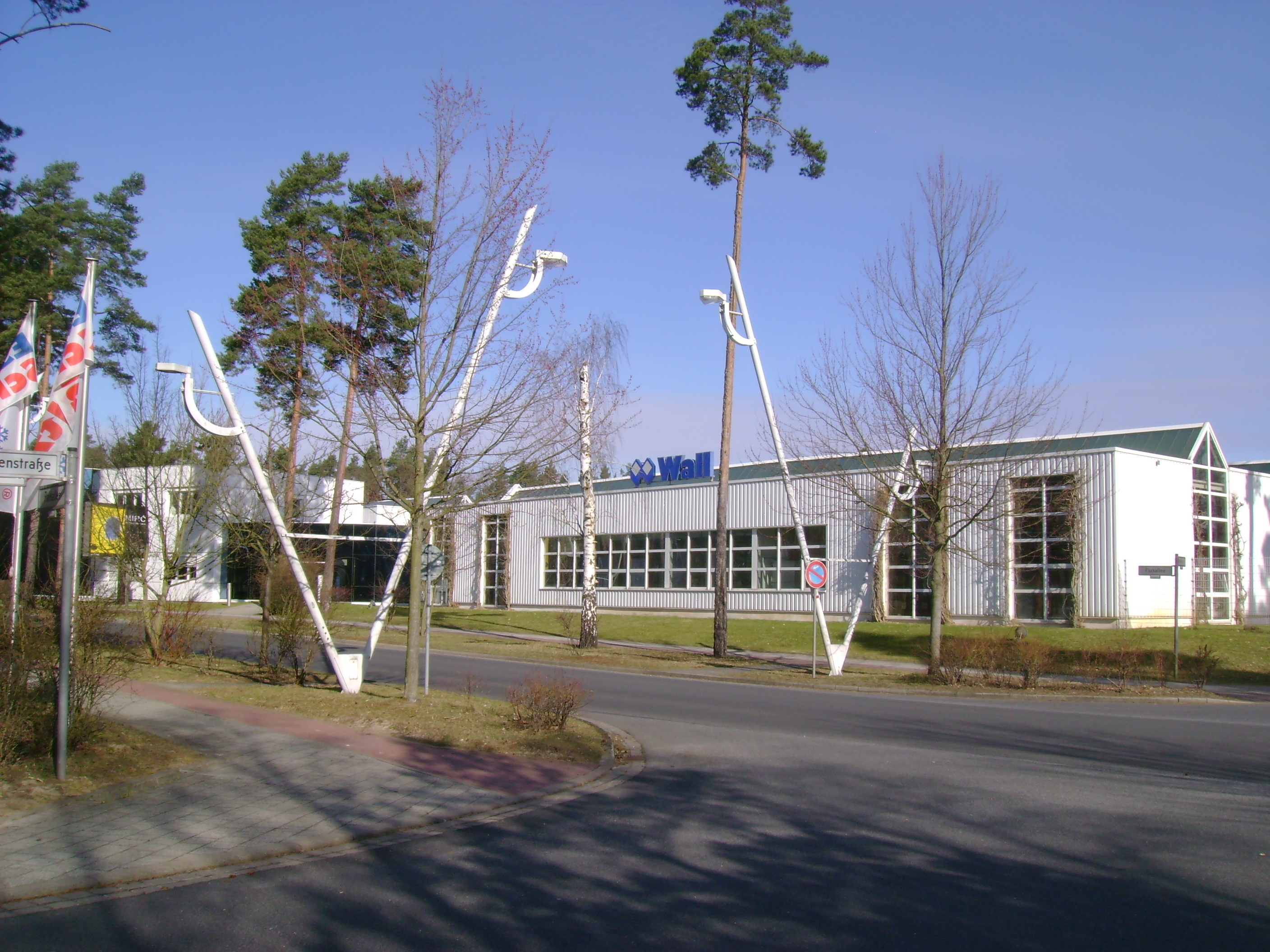 Produktionswerk der Wall AG in Velten, Businesspark, Parkallee / Birkenstraße